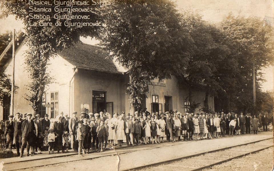 Đurđenovac - željeznički kolodvor 1869. godine